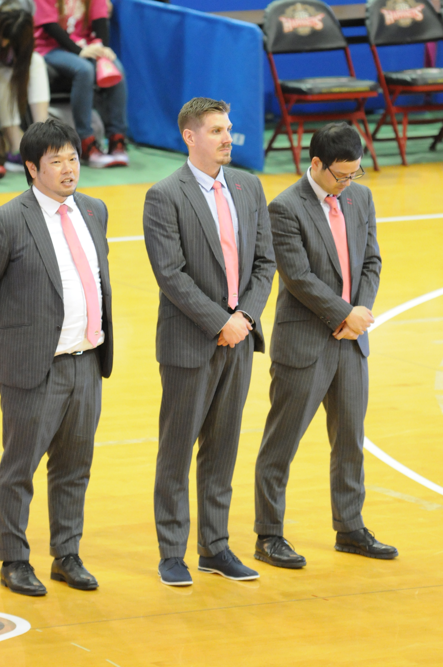 広島ドラゴンフライズ、ハミン・クウェインタンス選手。代々木第一体育館で。